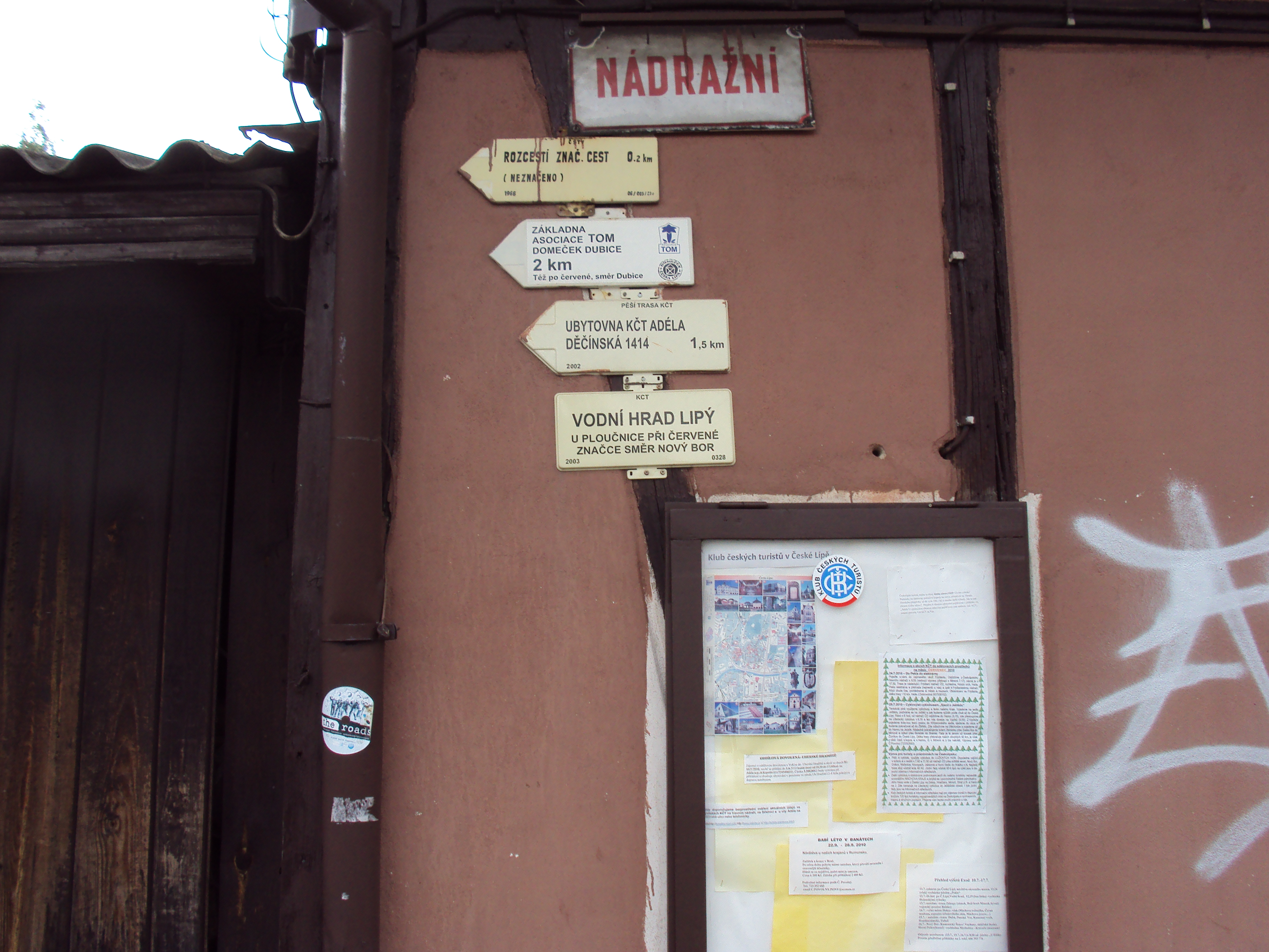 Rozcestníky před hlavním vlakovým nádražím v České Lípě, Nádražní ulici